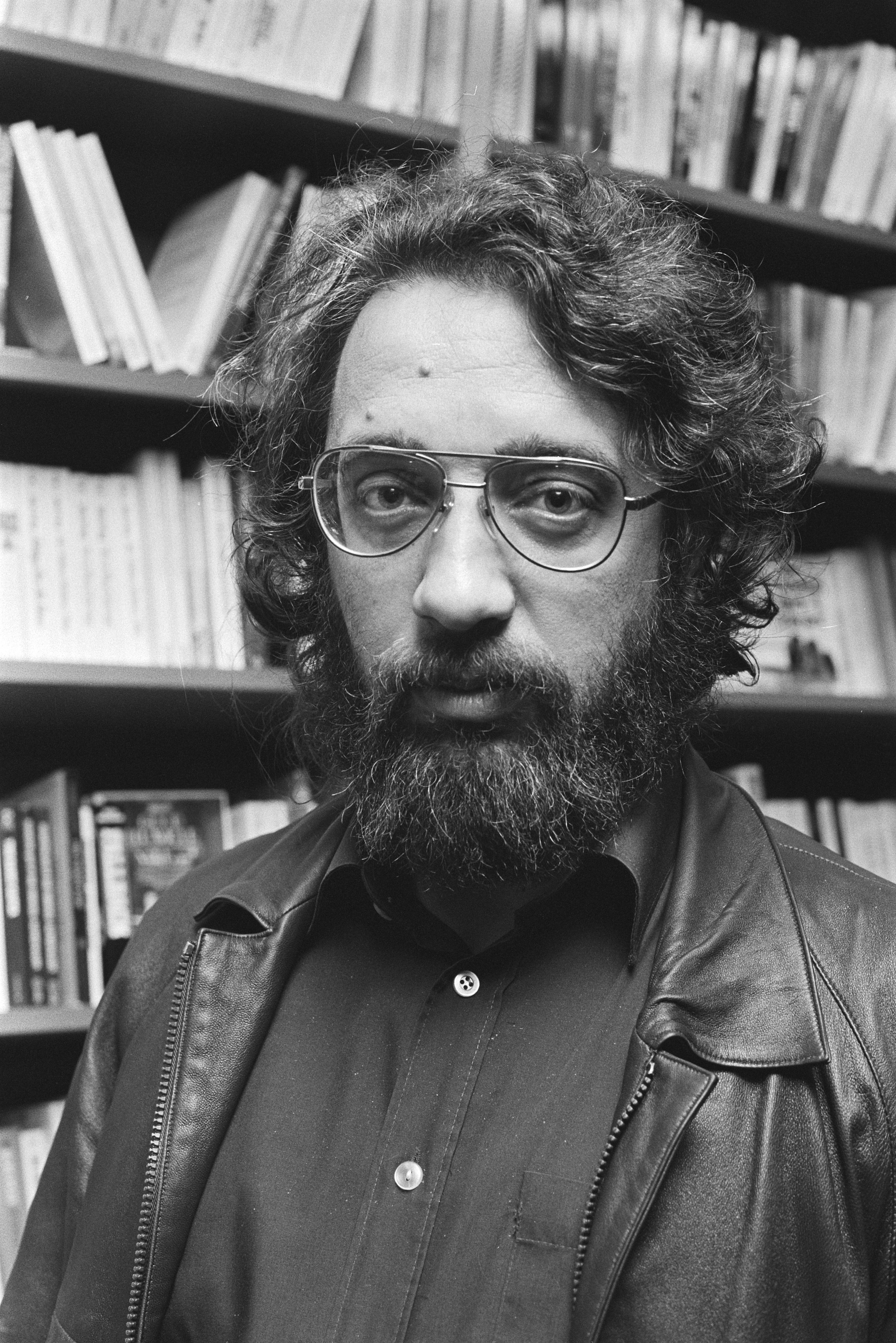 Collectie / Archief : Fotocollectie Anefo Reportage / Serie : [ onbekend ] Beschrijving : Walter van den Broeck Datum : 23 oktober 1982 Trefwoorden : portretten, schrijvers Persoonsnaam : Broeck, Walter van den Fotograaf : Bogaerts, Rob / Anefo Auteursrechthebbende : Nationaal Archief Materiaalsoort : Negatief (zwart/wit) Nummer archiefinventaris : bekijk toegang 2.24.01.05 Bestanddeelnummer : 932-3747